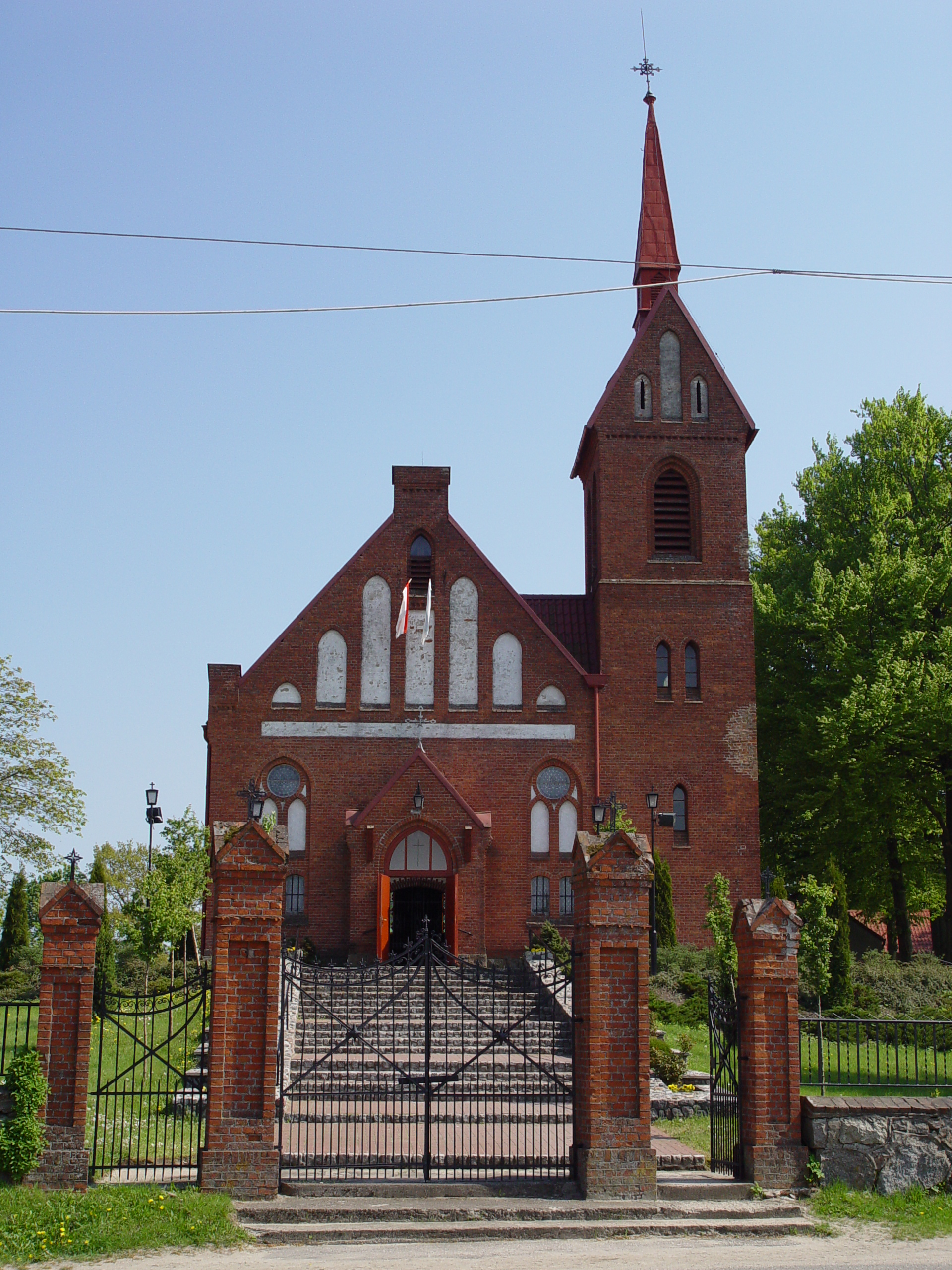 Kościół parafialny pod wezwaniem Niepokalanego Serca Maryi w Leśniewie.